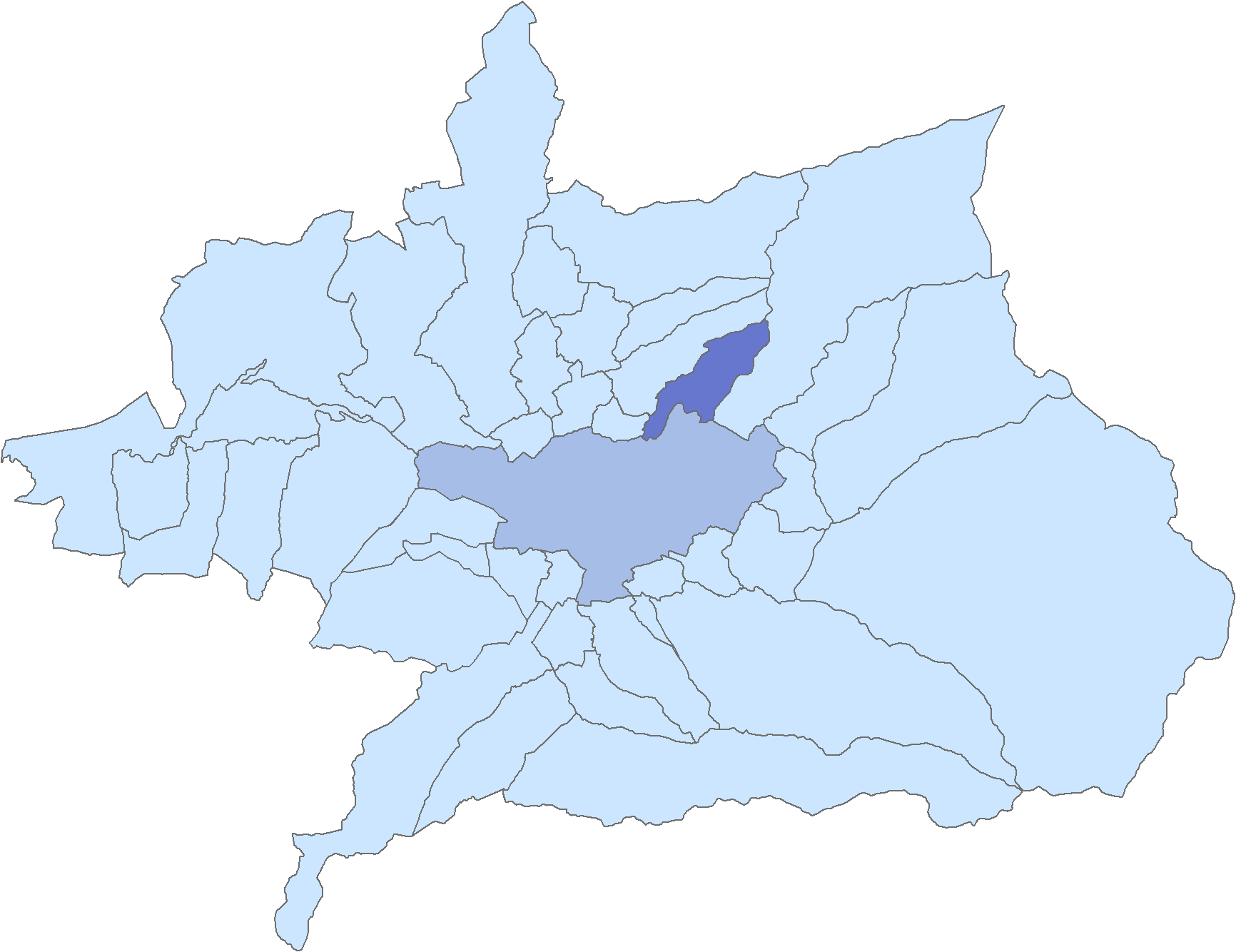 Situación del municipio de Víznar respecto a la comarca de la Vega de Granada, en España.